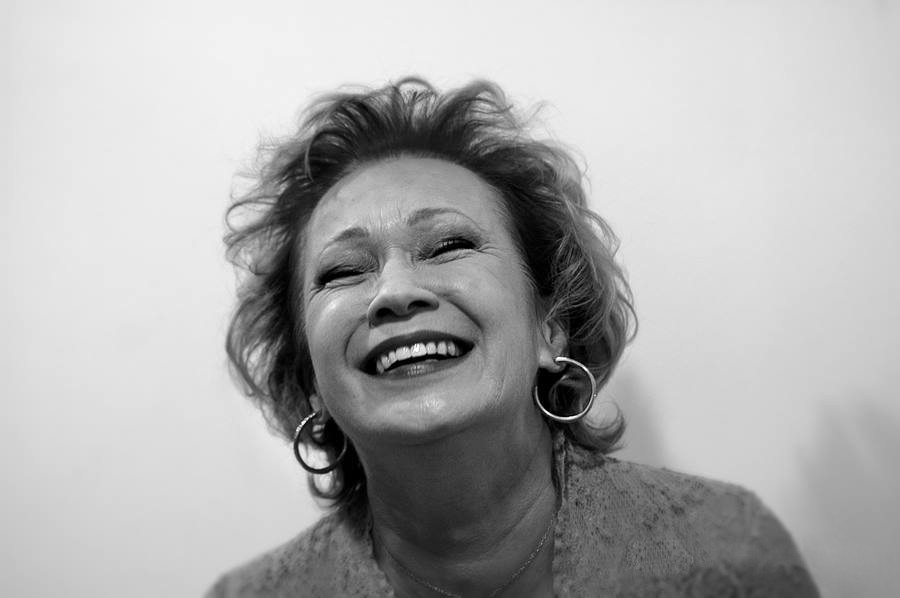 Udvaros Dorottya (Budapest, 1954. augusztus 4.) Kossuth- és Jászai Mari-díjas magyar színművésznő, a Halhatatlanok Társulatának örökös tagja.